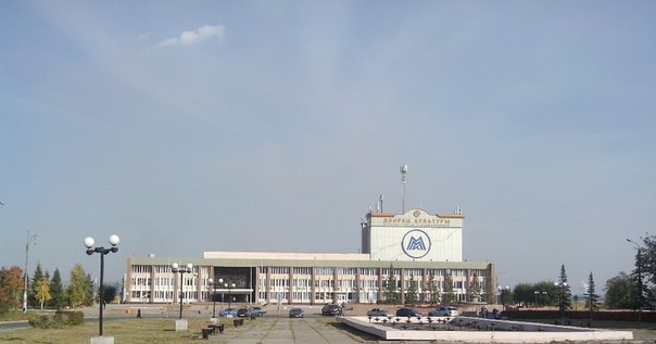 Дворец культуры металлургов имени Серго Орджоникидзе в городе Магнитогорске